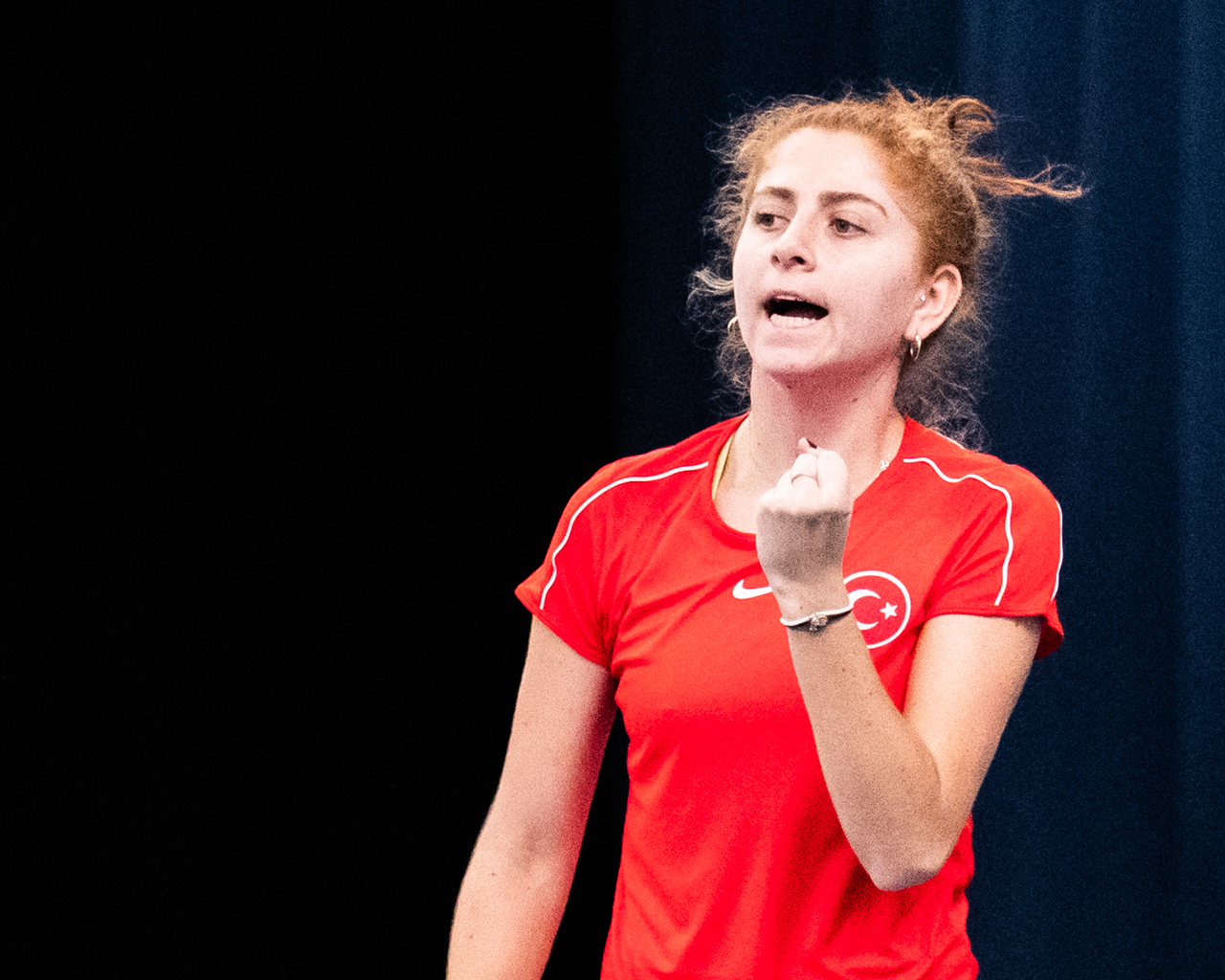 Berfu Cengiz